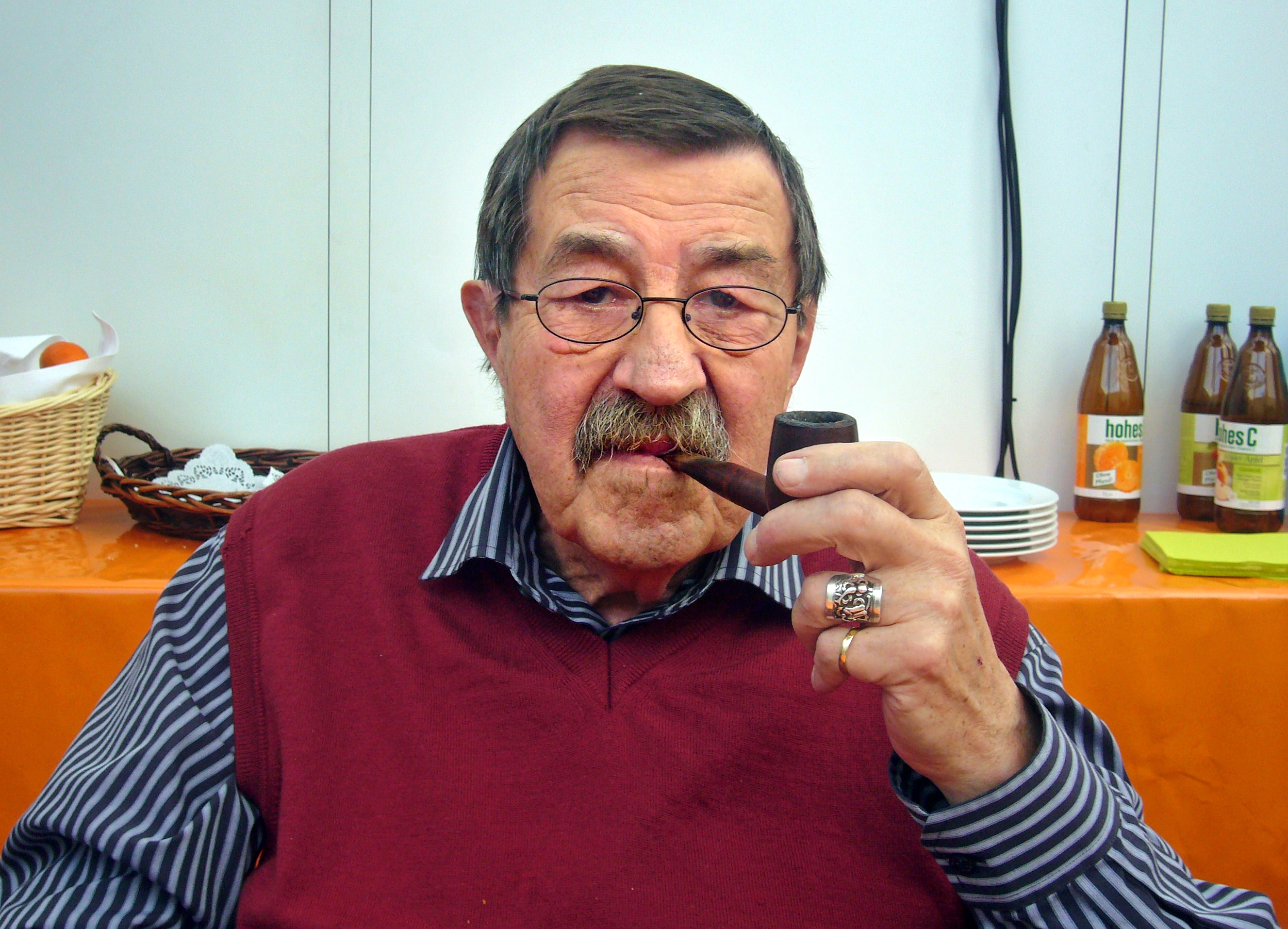 Dieses Fotos dürfen Sie honorarfrei nutzen, wenn Sie folgenden credit beachten: Copyright: Das blaue Sofa / Club Bertelsmann. Günter Grass wurde am 16. Oktober 1927 in Danzig als Sohn einer Kaufmannsfamilie geboren. Er studierte Bildhauerei an der Düsseldorfer Kunstakademie und an der Hochschule für Bildende Künste Berlin. Ab 1955 nahm er regelmäßig an den Tagungen der Gruppe 47 teil. 1956 erschien sein erstes Buch, der Gedichtband „Die Vorzüge der Windhühner“. Mit dem Roman „Die Blechtrommel „ wurde er 1959 schlagartig berühmt: Neben seinen Romanen (Hundejahre, örtlich betäubt, Der Butt, Die Rättin, Ein weites Feld u.v.a.) entstehen Gedichtbände (Gleisdreieck, Ausgefragt, Letzte Tänze u.a.), Kurzprosa, Theaterspiele, Essays, Novellen (Katz und Maus, Im Krebsgang), Erzählungen (Das Treffen in Telgte, Unkenrufe, Aus dem Tagebuch einer Schnecke, Kopfgeburten oder die Deutschen sterben aus und Mein Jahrhundert) sowie autobiografische Werke (Beim Häuten der Zwiebel, Die Box, Grimms Wörter). Außerdem ist Grass als Zeichner, Grafiker und Bildhauer tätig, viele Bücher mit seinem bildkünstlerischen Werk sind seit 1986 erschienen. 1993 übernimmt der Steidl Verlag die Weltrechte am Werk von Günter Grass. Große Teile seines literarischen Werks hat der Autor für Hörbuch-Editionen selbst eingelesen. Aus den zahlreichen Auszeichnungen, mit denen Grass geehrt wurde, ragt der Nobelpreis für Literatur 1999 hervor.